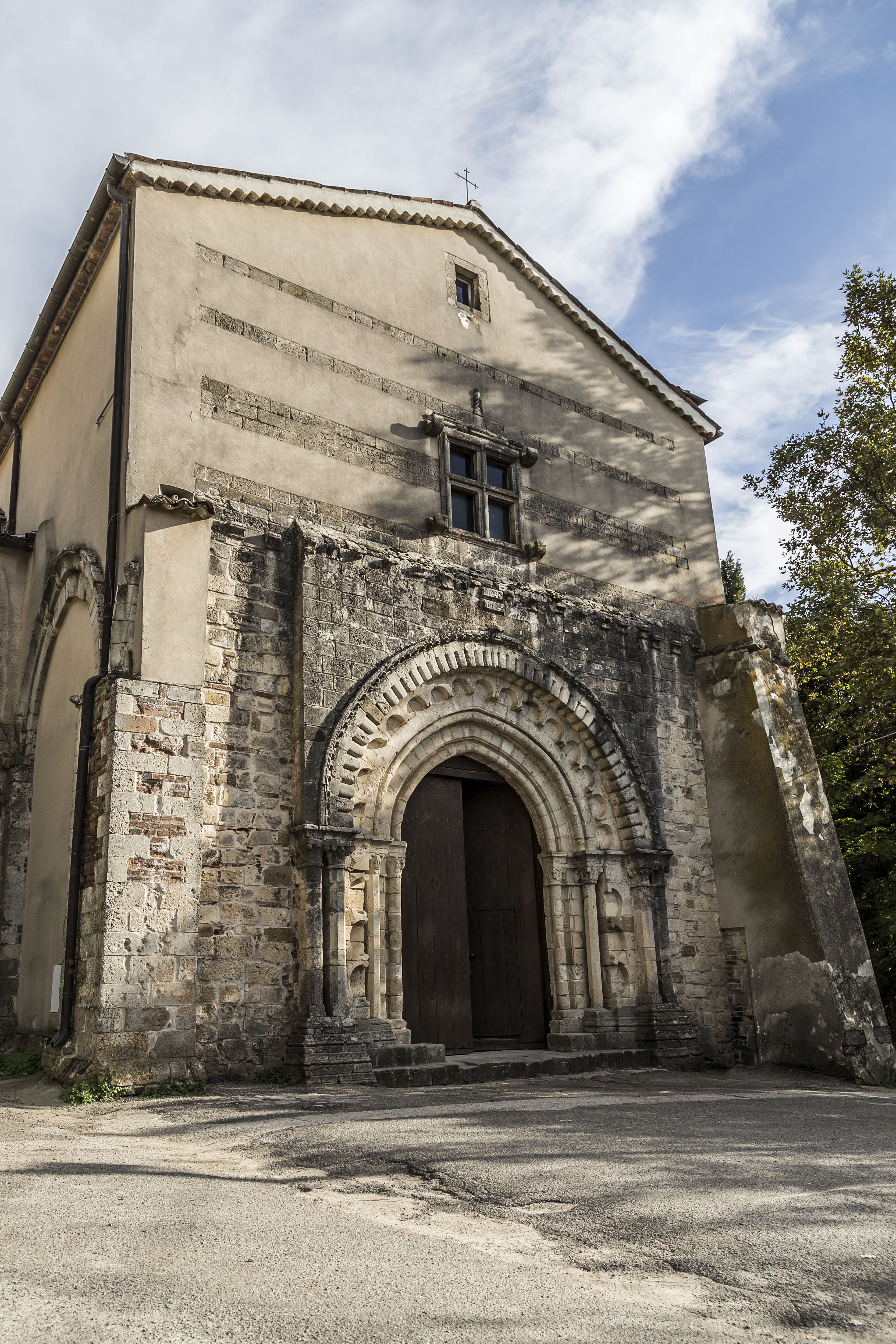 Facciata dell'abbazia cistercense This is a photo of a monument which is part of cultural heritage of Italy.